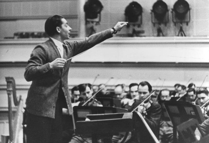 Herbert von Karajan Staatskapellmeister Herbert von Karajan Abgebildete Personen: Karajan, Herbert von: Dirigent, Generalmusikdirektor der Wiener Staatsoper, Österreich